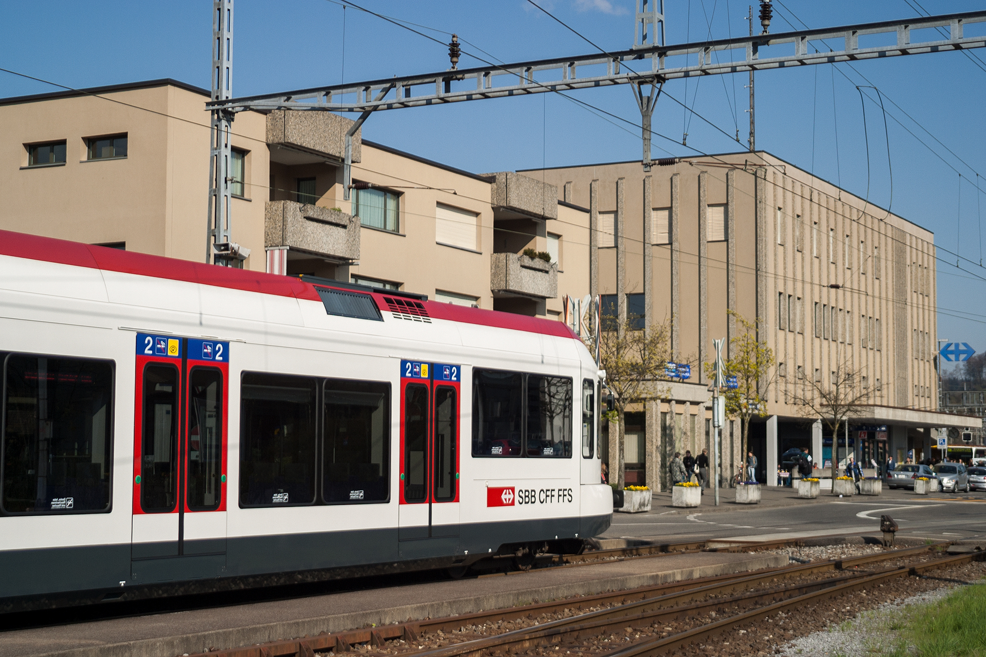 Seetalbahn beim Bahnhof Lenzburg (AG)